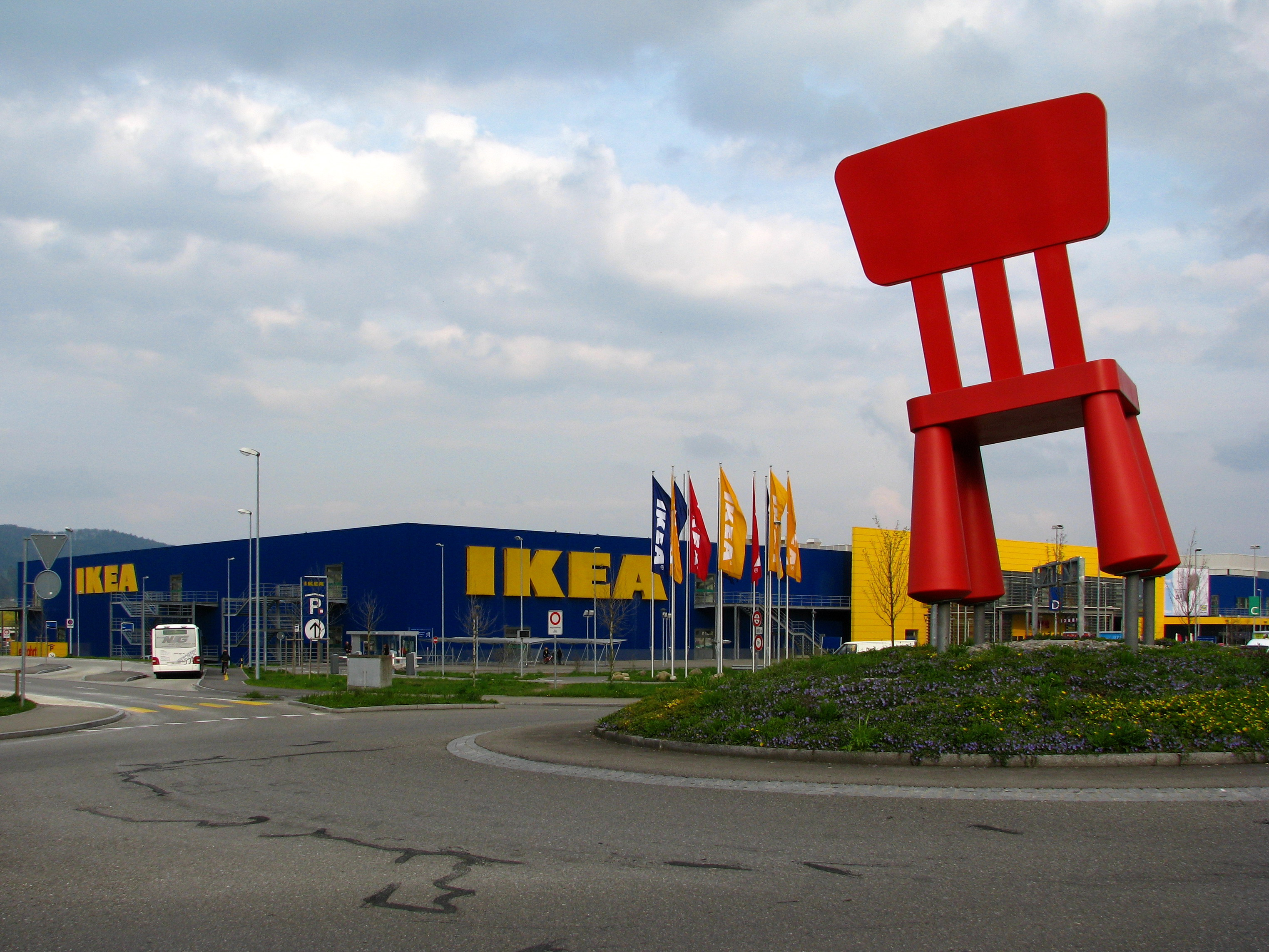 IKEA in Spreitenbach in the Limmat Valley (Switzerland)